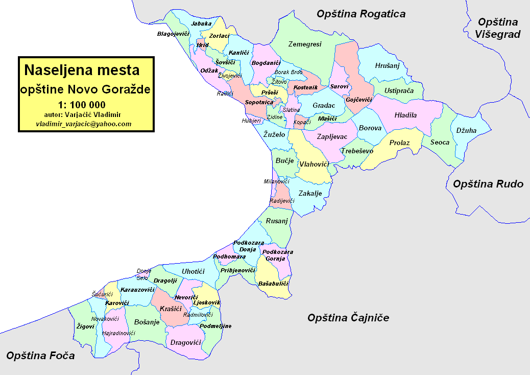 Opština Novo Goražde